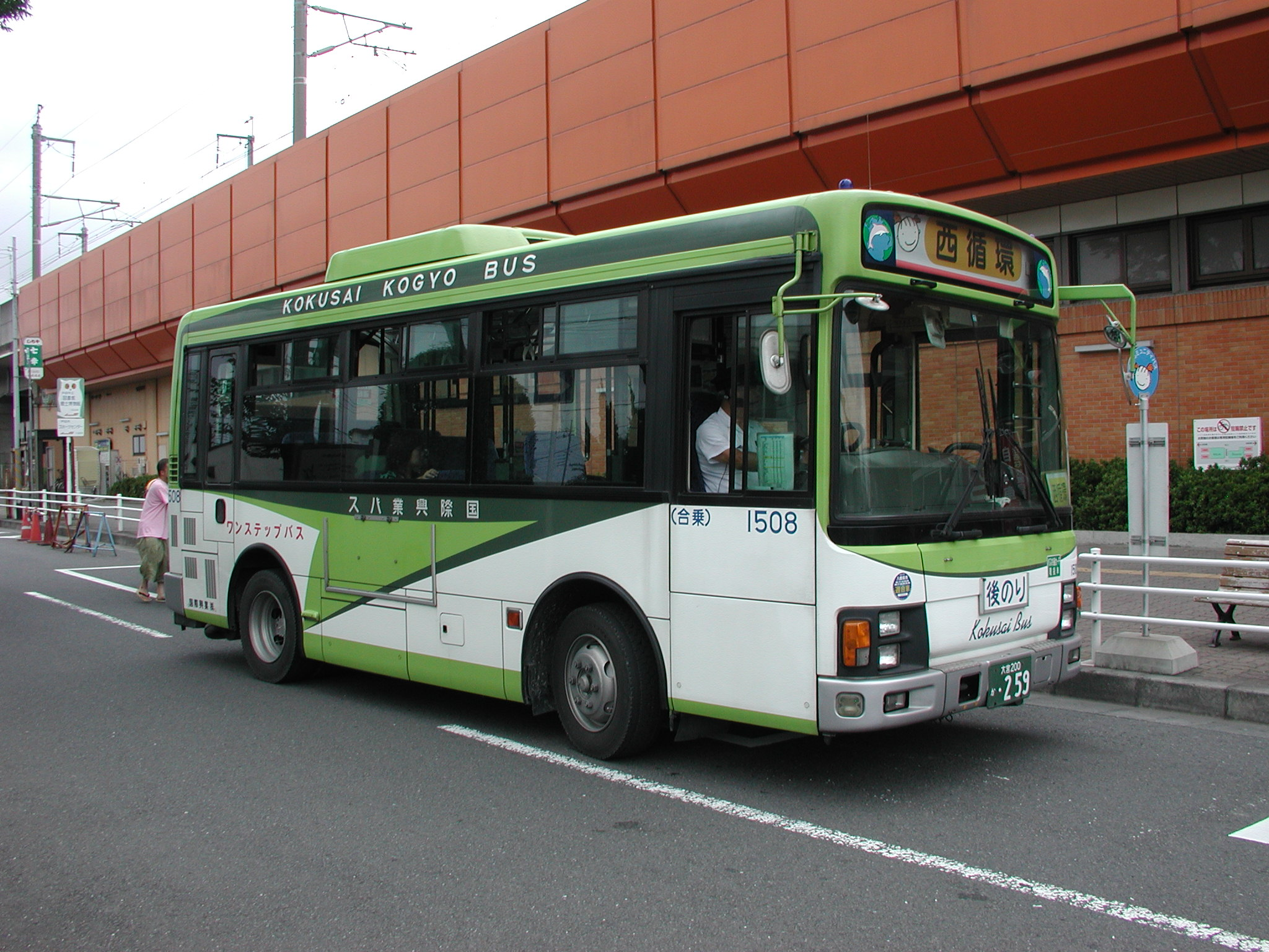 国際興業一般路線塗装 小型ワンステップ車両（社号：1508/いすゞ・エルガミオ7M：KK-LR233E1）：「戸田市コミュニティバス『toco』」西循環での代車運用 この車種による方向幕にはtocoのほかに「蕨市コミュニティバス『ぷらっとわらび』」の幕も収録されている。